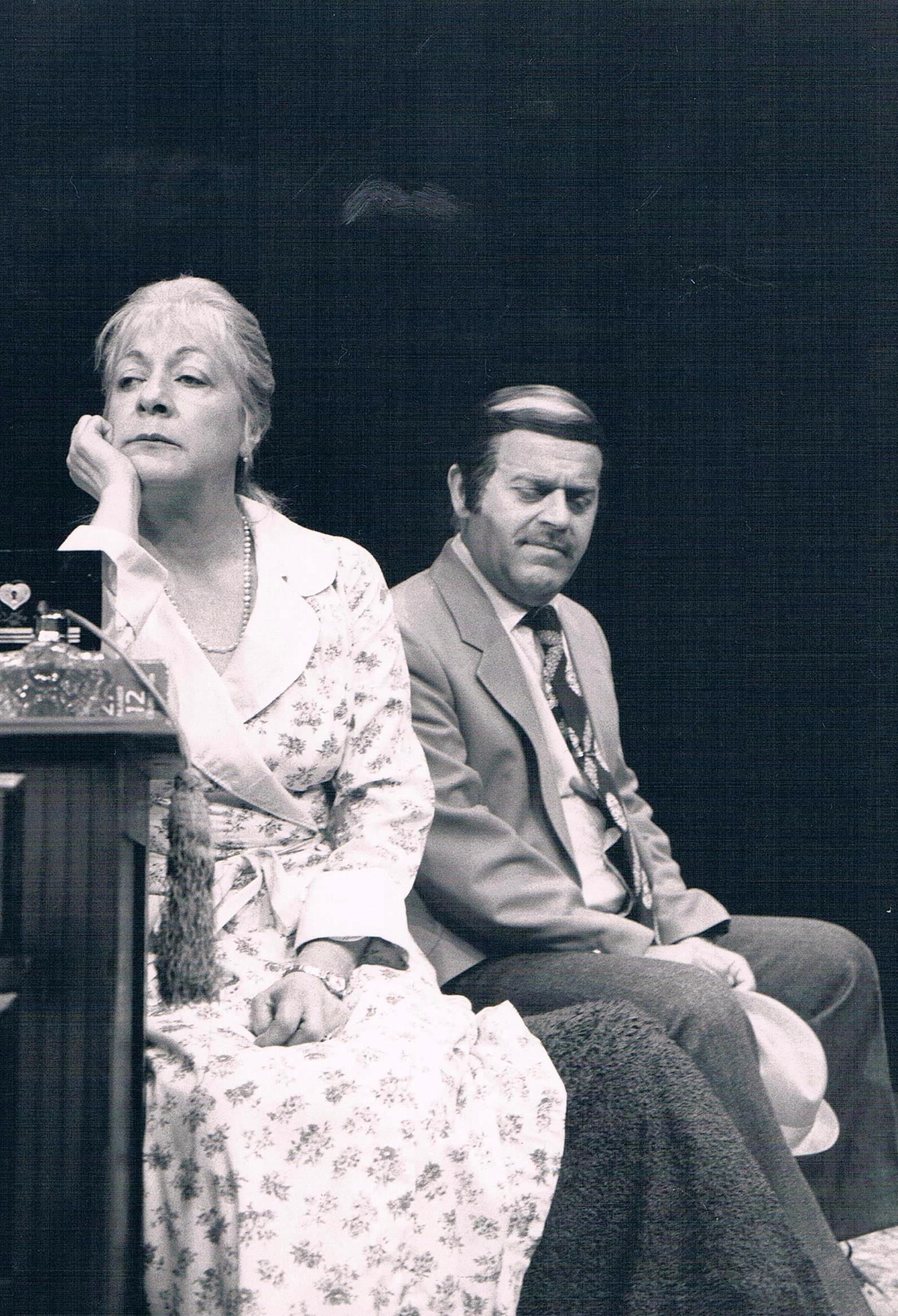 רבקה גור וניסים עזיקרי בהצגה "אנשים קשים". תיאטרון "הבימה"